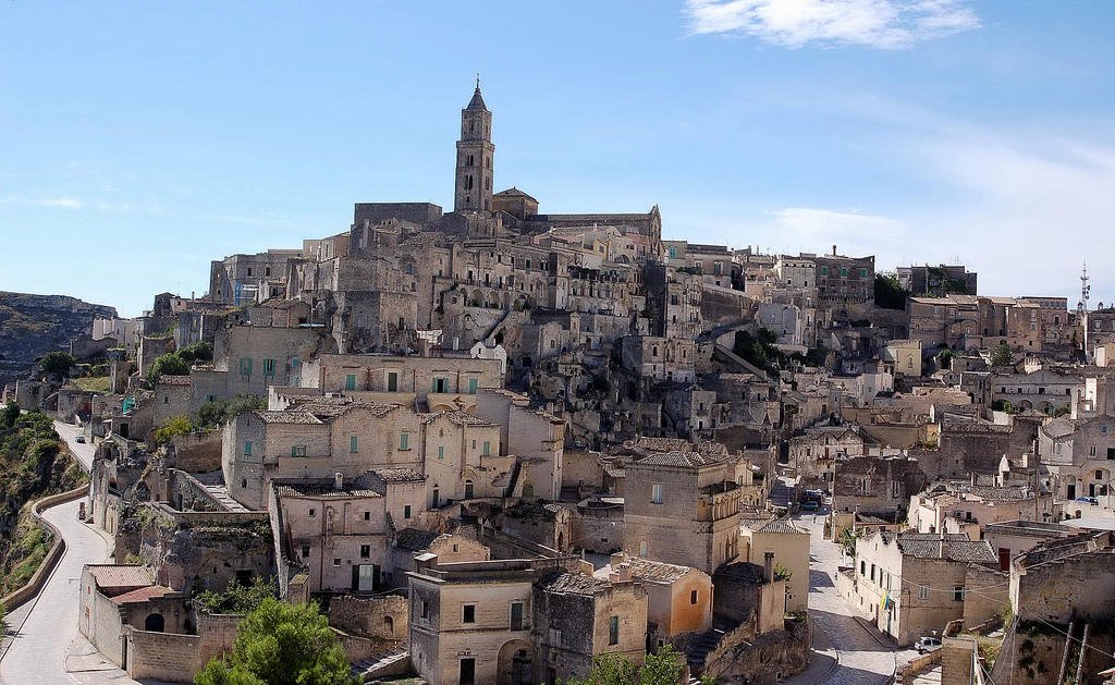 Matera,Basilicata, Italia